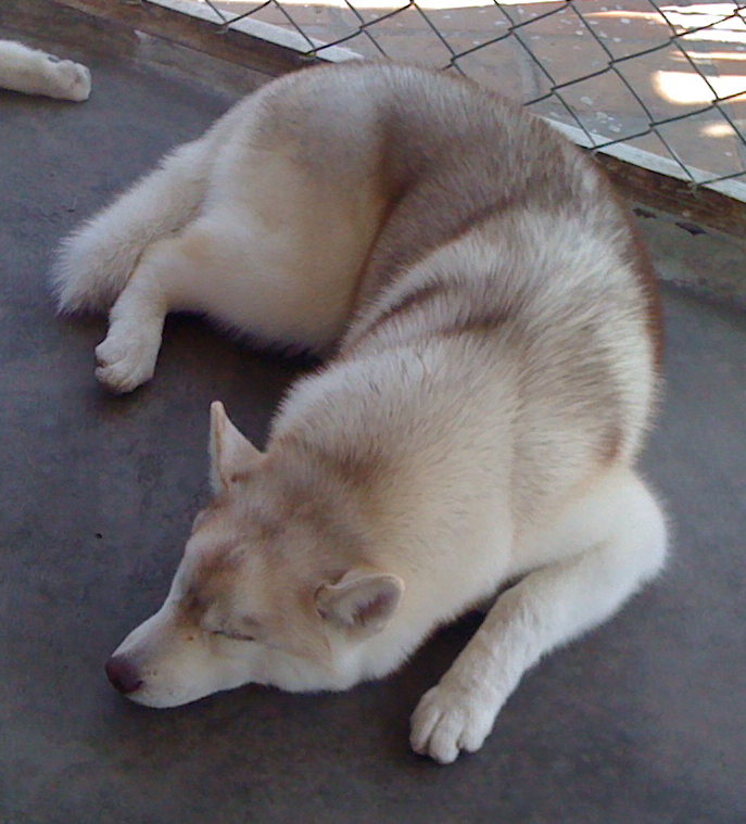 Husky Siberiana de 9 meses de edad